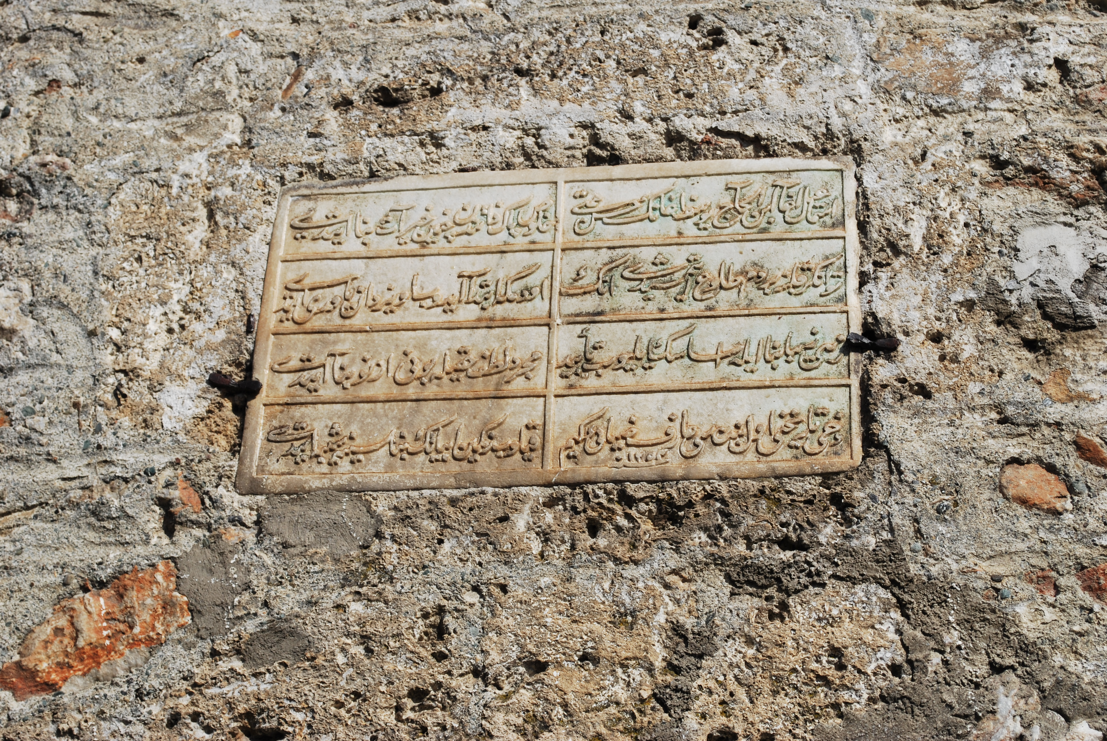 Натрис на Саат кулата во Гостивар